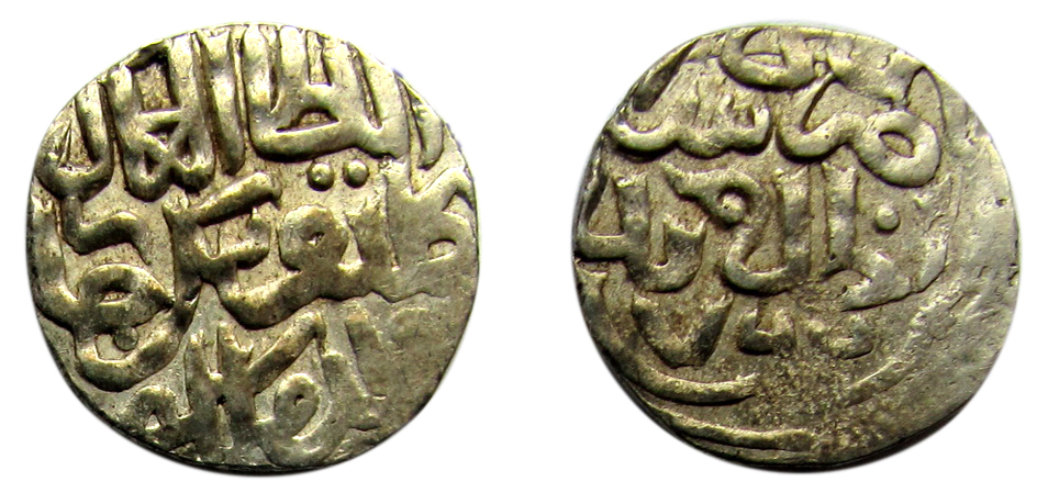 Найден в 2010 году в составе большого клада на территории Воронежской области